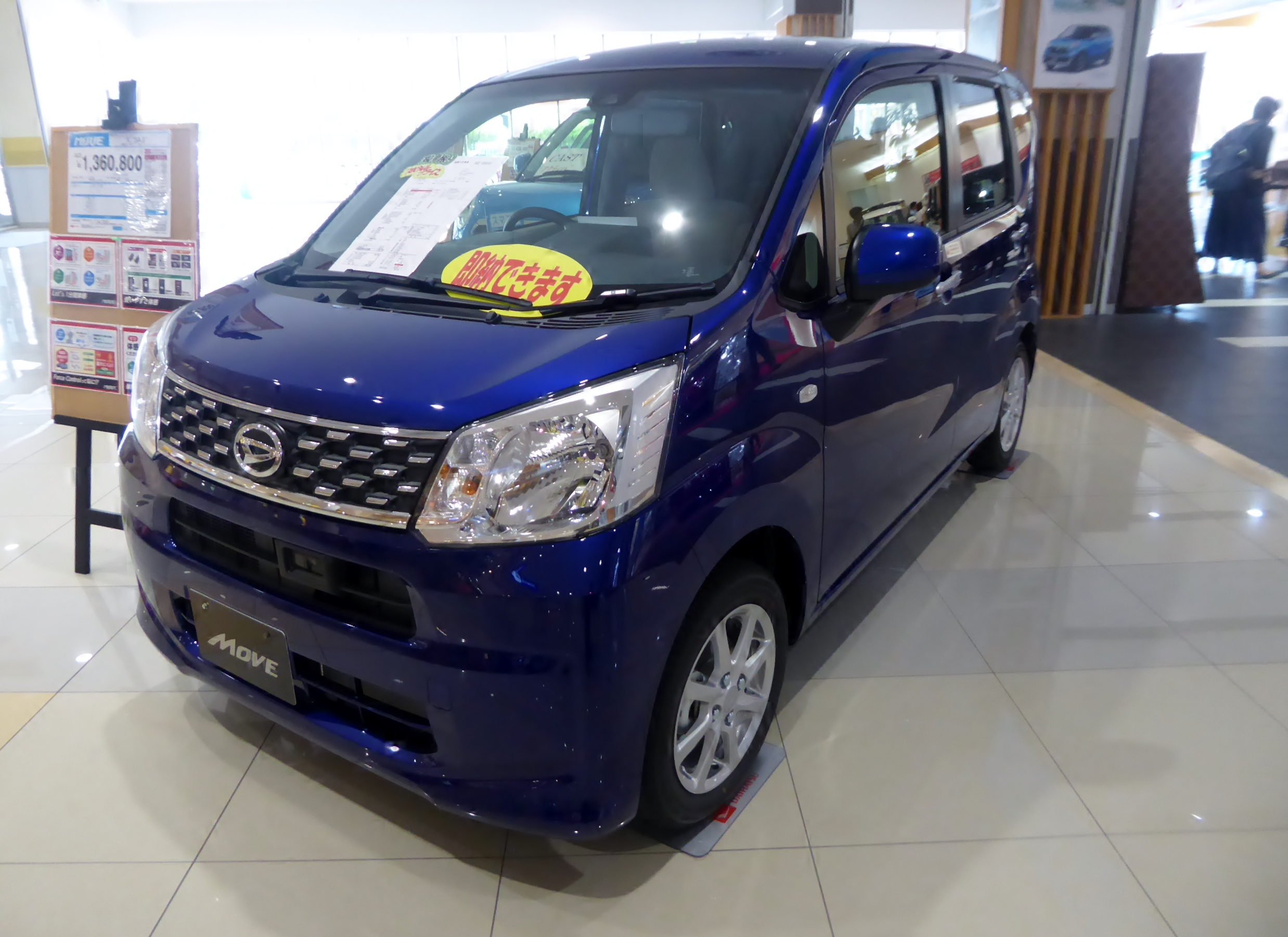 DBA-LA150S-GBGF型ダイハツ・ムーヴX"SA II"をフロントから撮影。